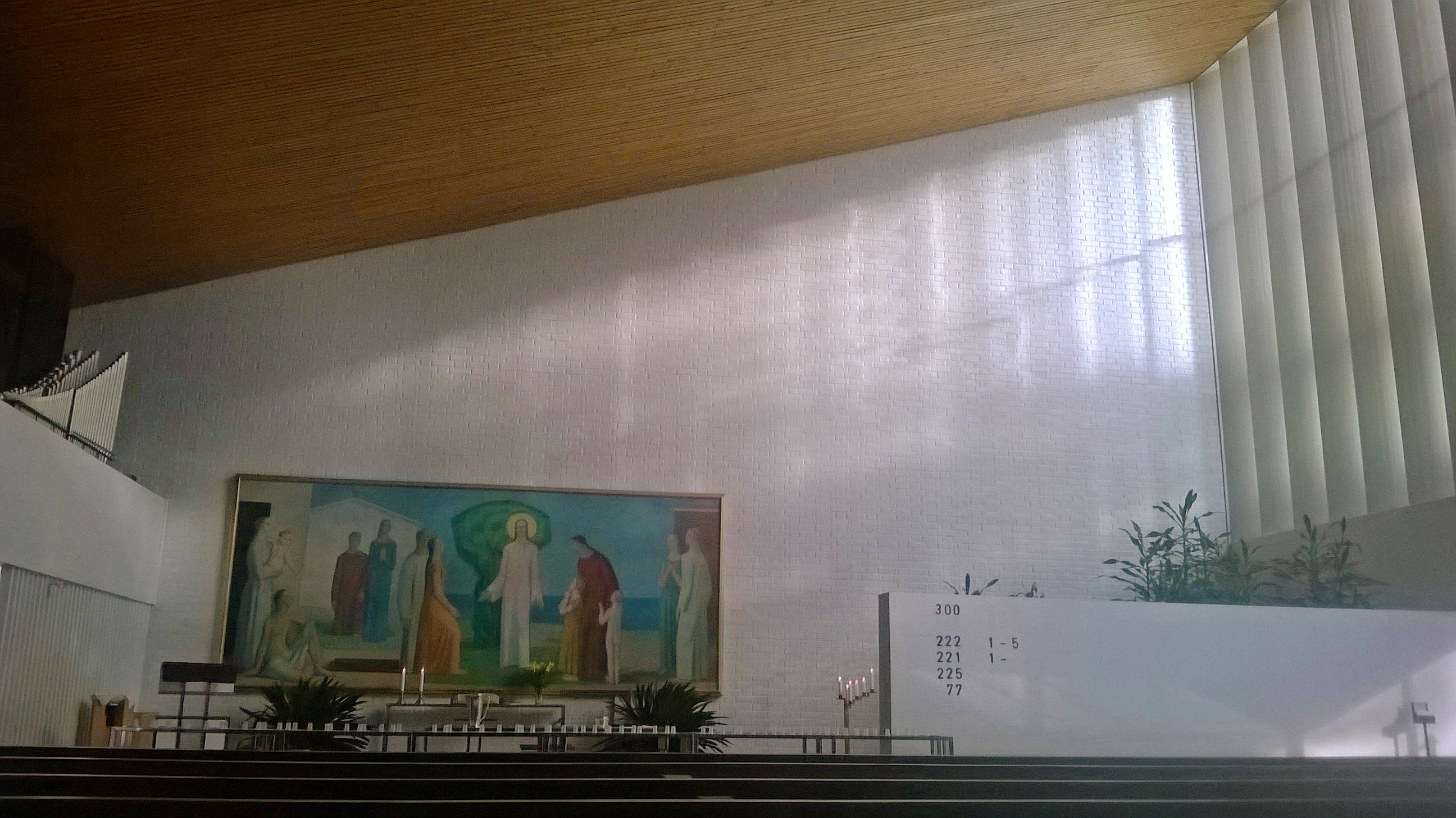 Paattionlehdon hautausmaan kappelin interiööri.